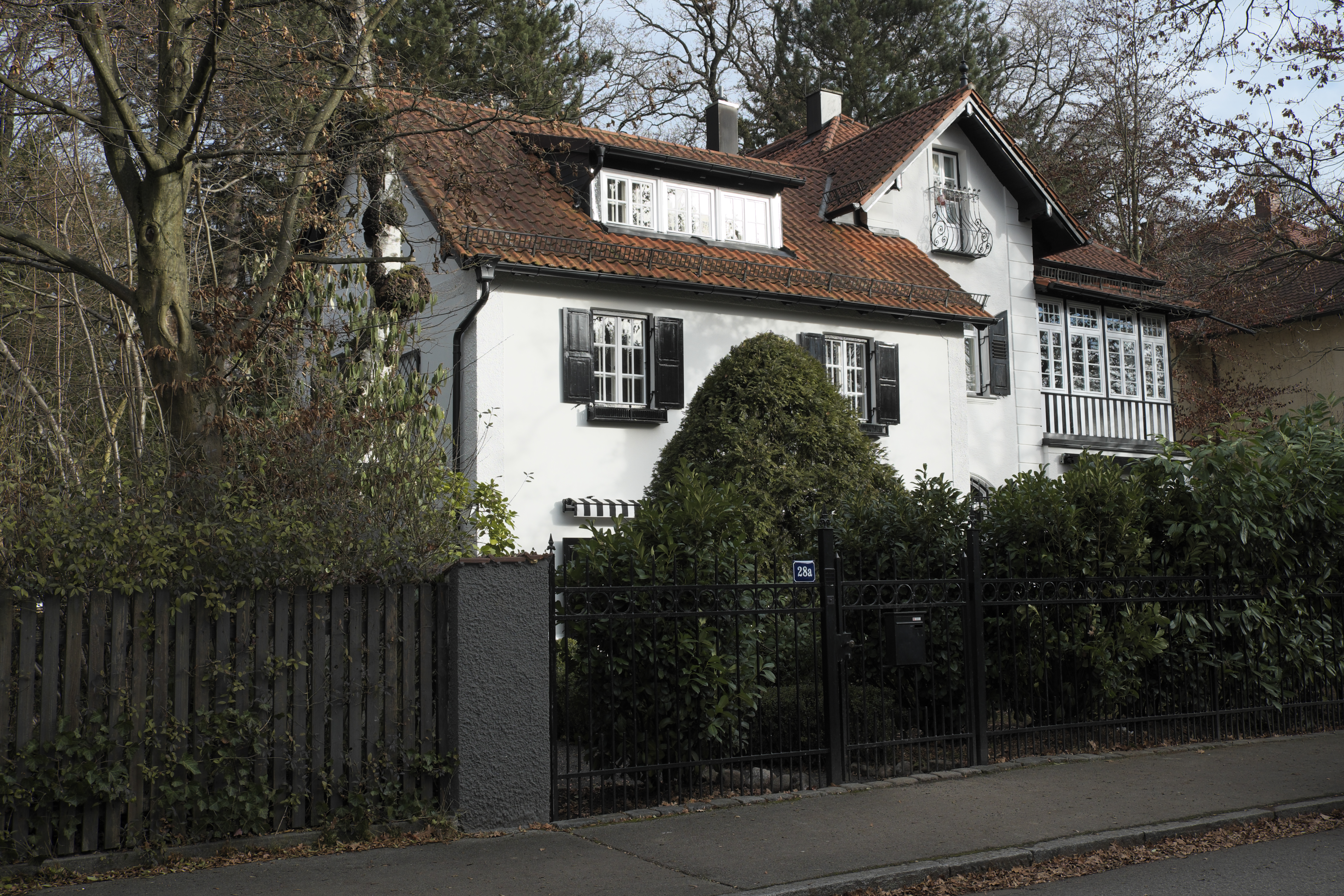 Villa in der Lichtingerstraße 28 in Pasing im Stadtbezirk Pasing-Obermenzing in München (Bayern/Deutschland)